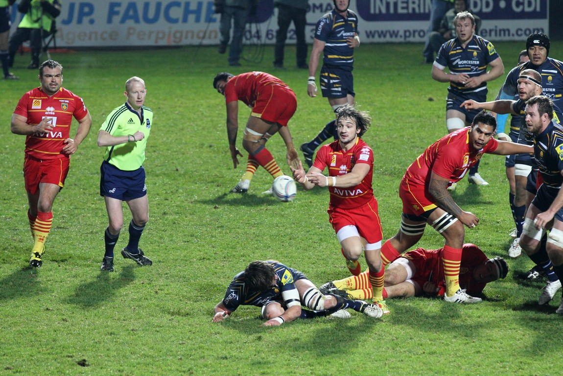 Florian Cazenave ouvre face à Worcester (Ang) lors de la quatrième journée d'Amlin Challenge Cup